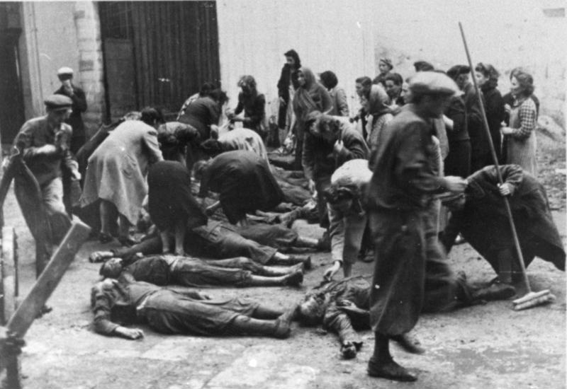 Von der G.P.U. ermordete Volksdeutsche werden im Gefängnishof von ihren Angehörigen identifiziert. Aufnahme: 10.7.41, Tarnopol, Westukraine, Russland Bildberichter: Hübner